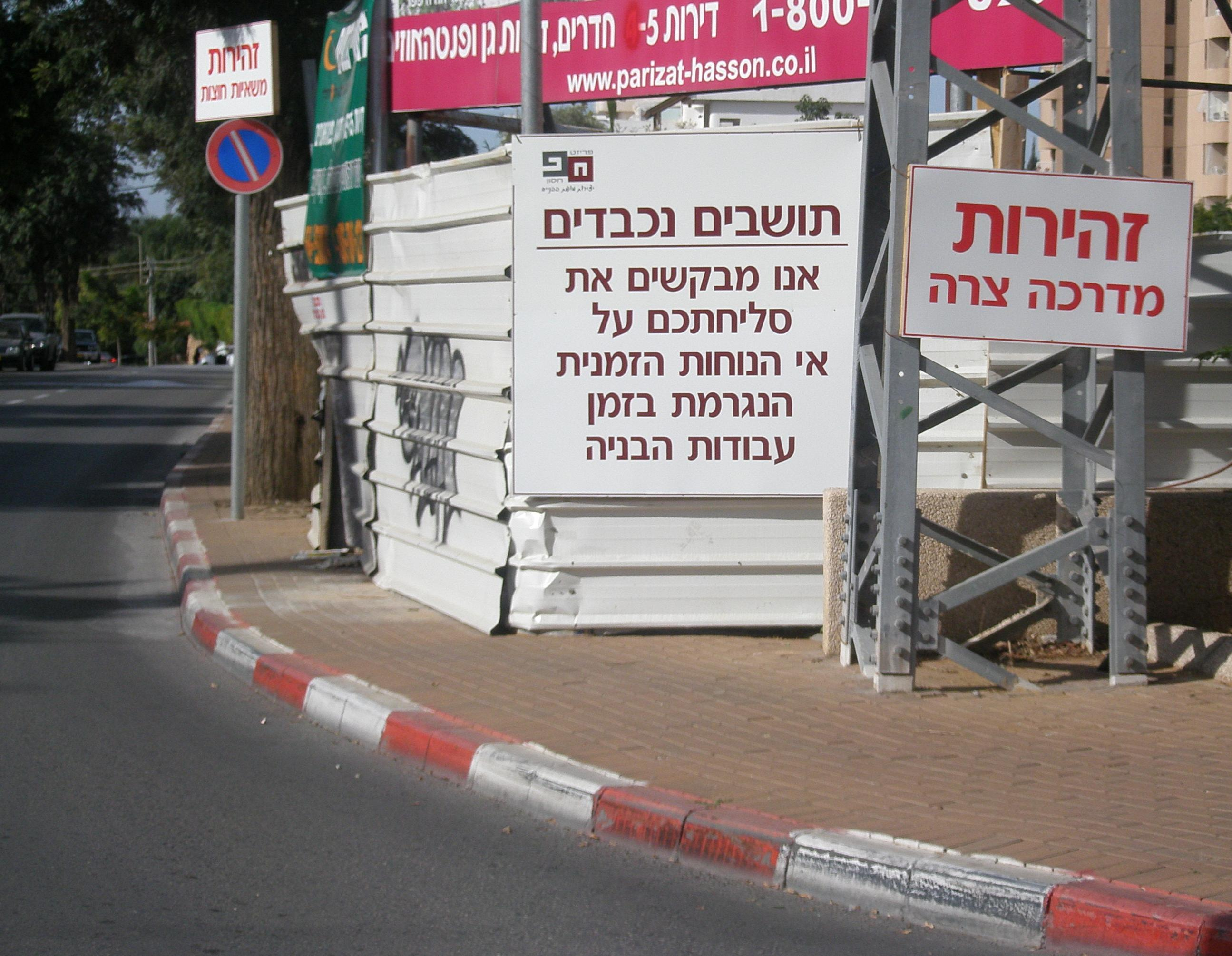 התנצלות של קבלן בניין בהרצליה